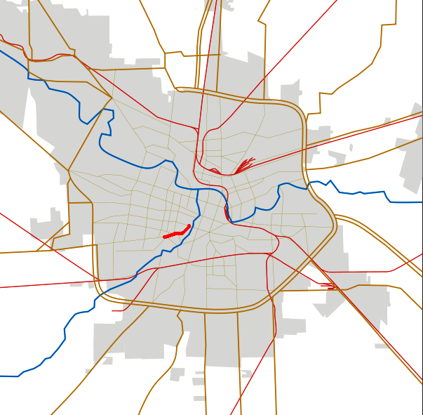 Marcación de la ubicaión de la avenida dentro de la ciudad de Córdoba.